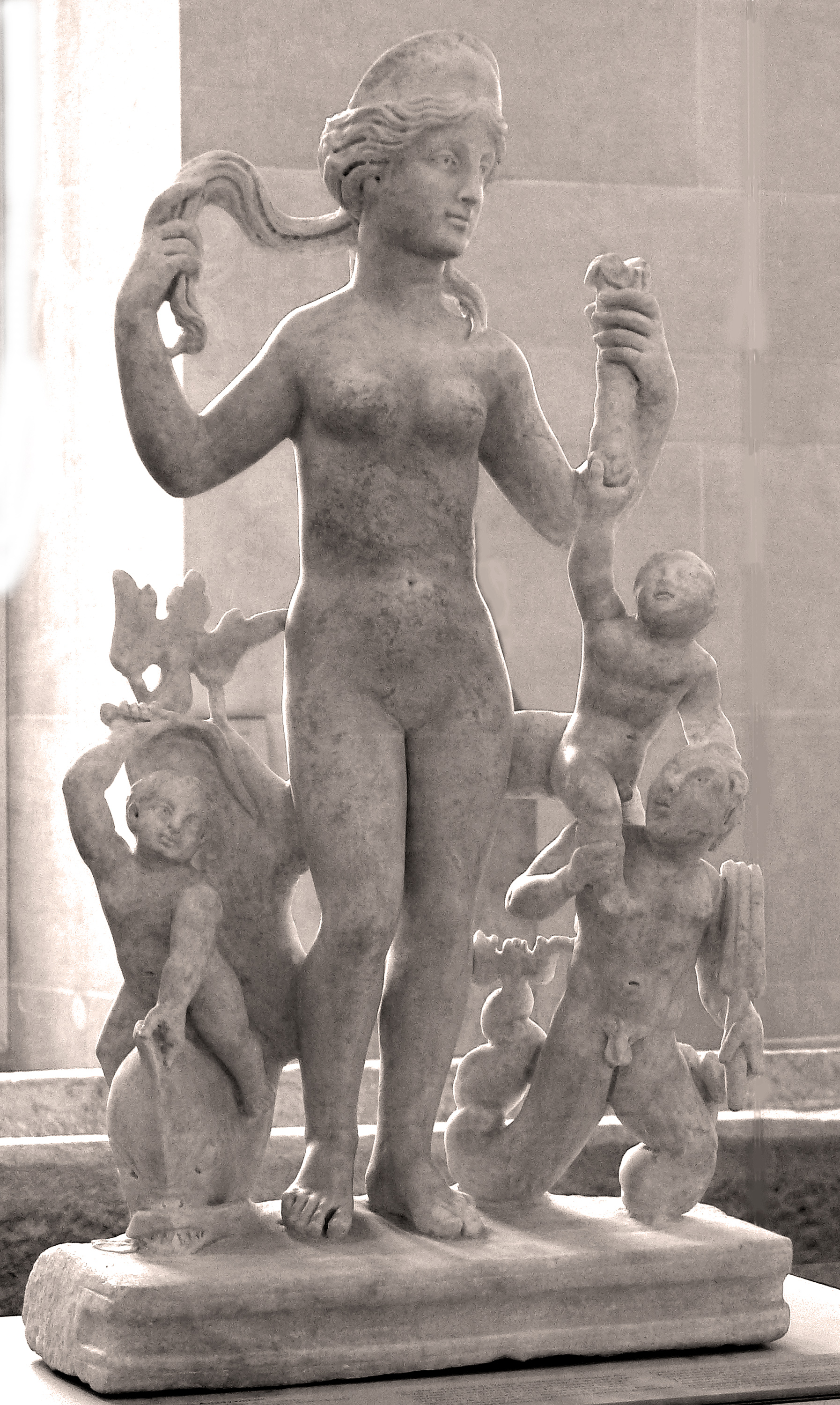 Vénus Anadyomène (dite aussi de Montagne).